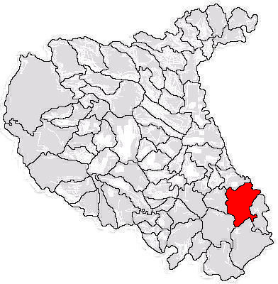 Categorie:Hărţi ale judeţului Vrancea